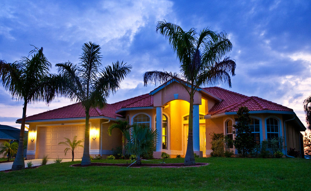 Ferienhaus Villa Pelican Bay, Cape Coral, Florida at sunset